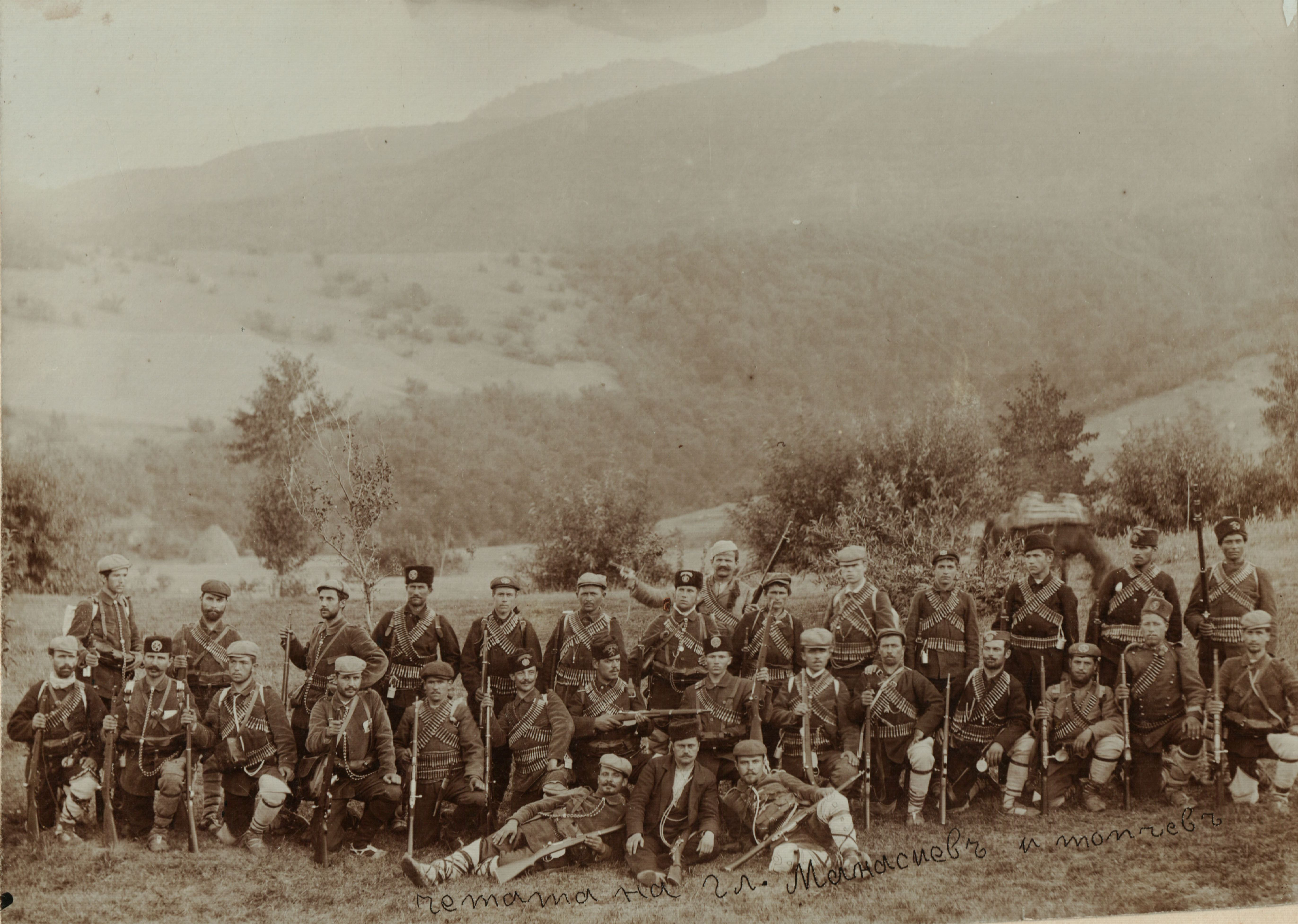 Снимка на четата на Манасиев